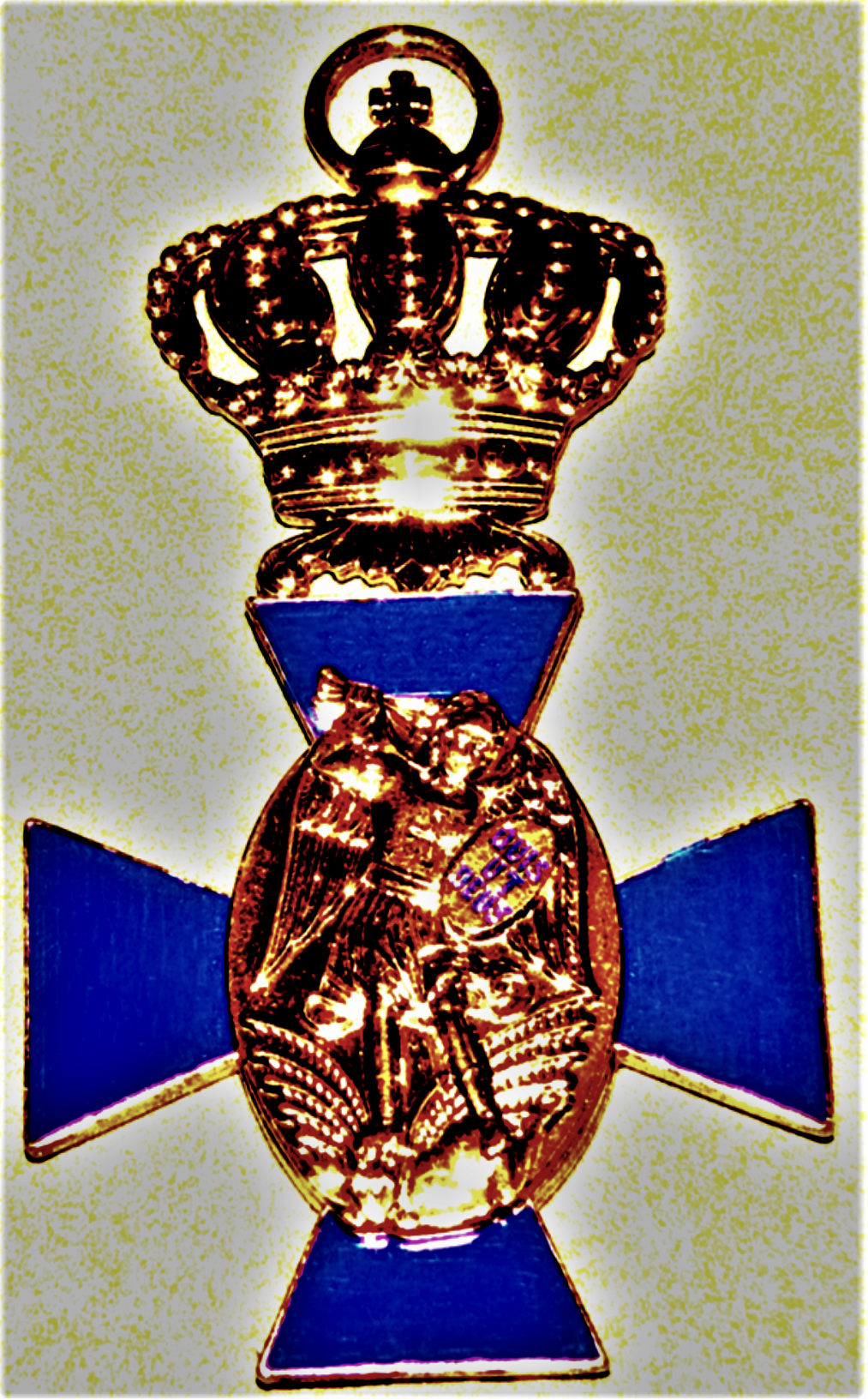 Verdienstorden zum Heiligen Michael 2. Klasse, Ausgabe 1916